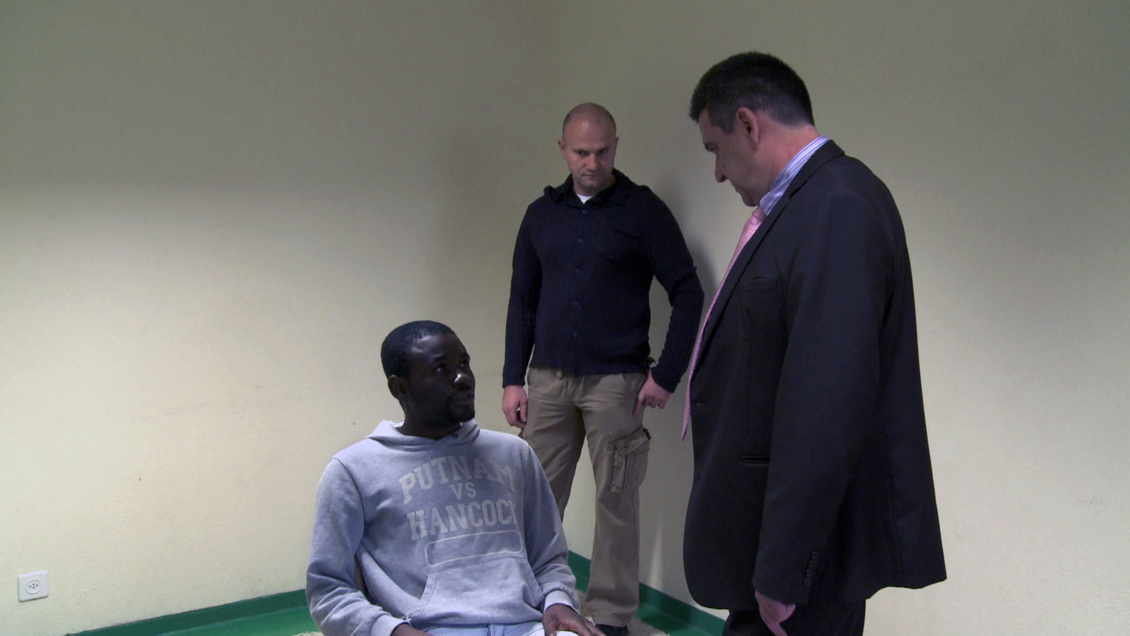 Le directeur de Frambois Jean-Michel Claude, protagoniste du film « Vol Spécial » de Fernand Melgar, informe le détenu Elvis de son expulsion par vol spécial.